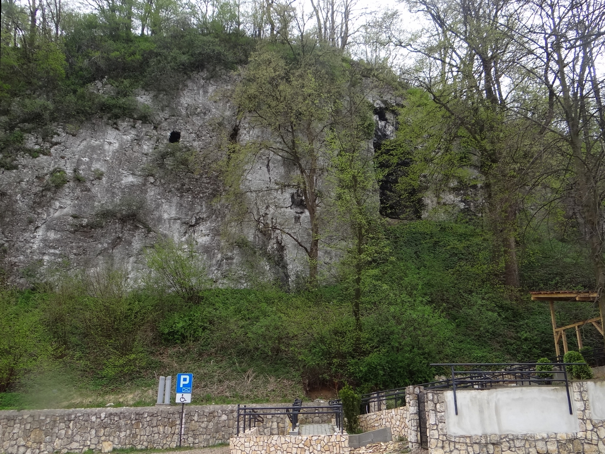 Skały Skurwysyn i Mur przy Skurwysynie nad Wisłą we Wzgórzach Tynieckich